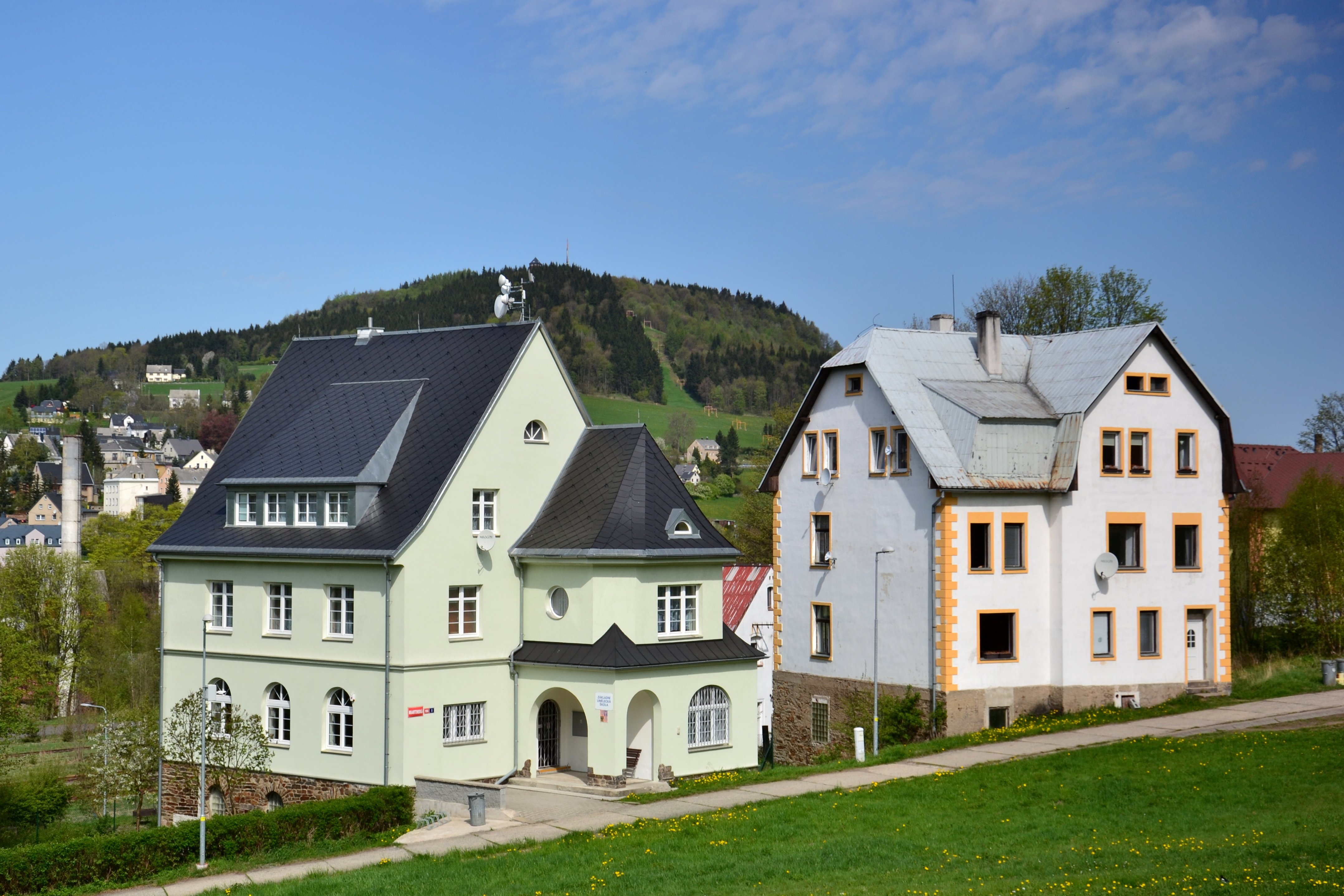 Vejprty – Martinská ulice se Základní uměleckou školou (dům vlevo)